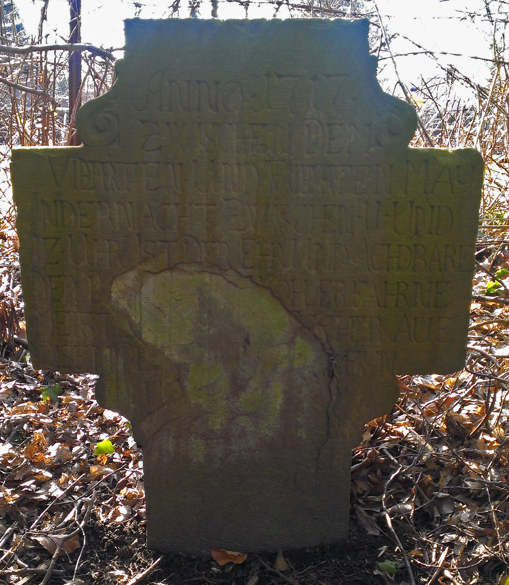 Niedriges Steinkreuz in Essen-Horst: Rur Erinnerung und vermutlich zum Gedenken an die Ermordung des Baumeisters Conrad Fischer durch Reinhard Cop und Mittäter am 4. Mai 1717 nahe bei Haus Horst